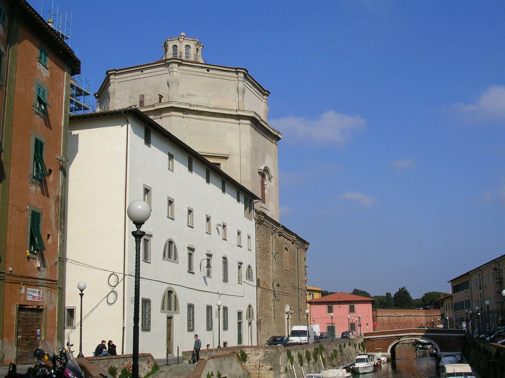 Livorno: la chiesa di Santa Caterina (XVIII secolo) caratterizzata da una cupola alta 63 metri. Si trova nel quartiere della Venezia Nuova.